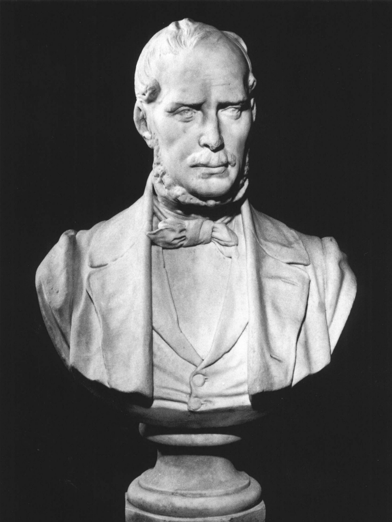 Busto di Samuele Romanin, opera di Augusto Benvenuti del 1896. Il busto fa parte del Panteon Veneto, conservato presso Palazzo Loredan di Campo Santo Stefano a Venezia.